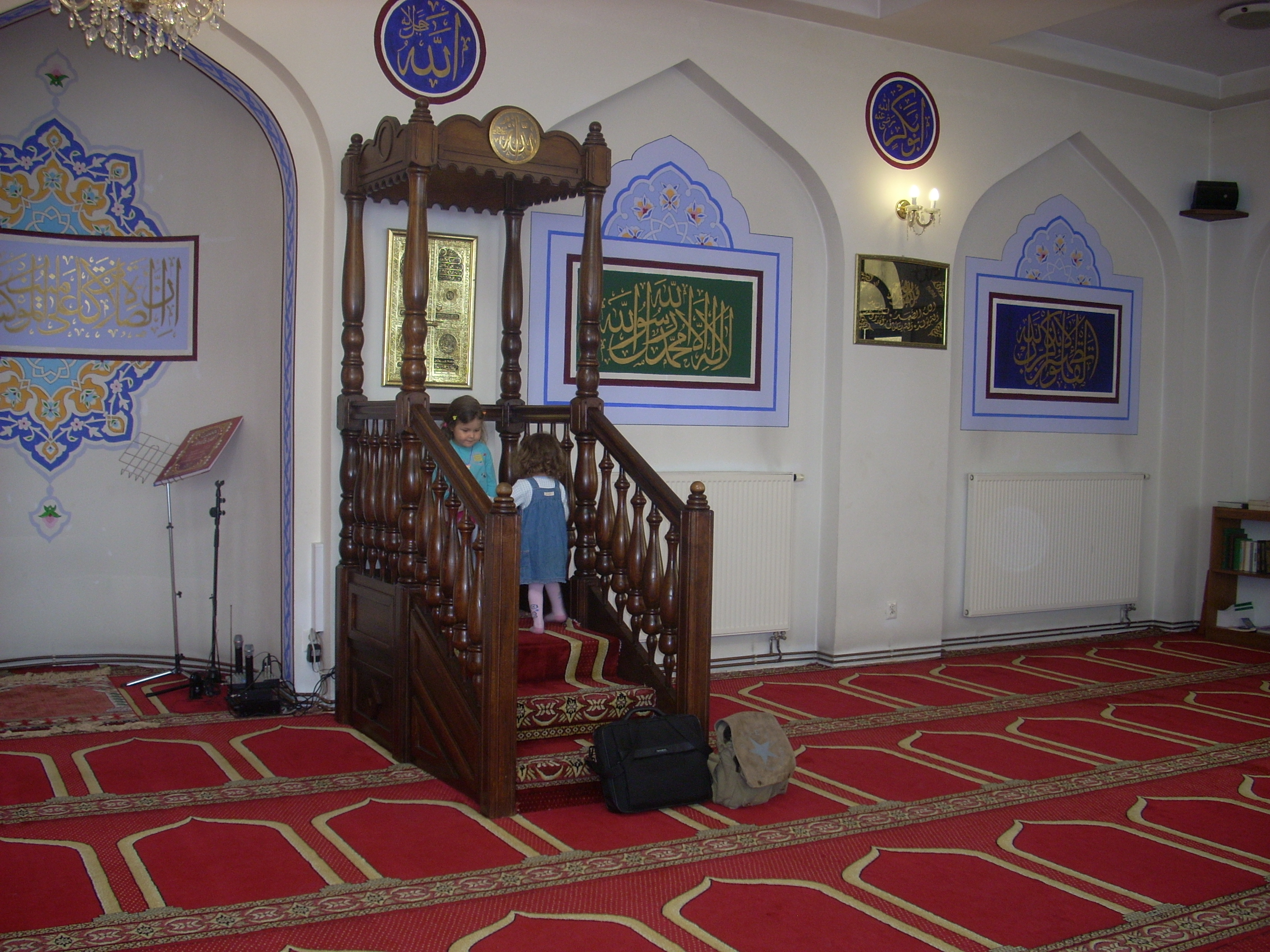 Wnętrze warszawskiego meczetu przy ul. Wiertniczej